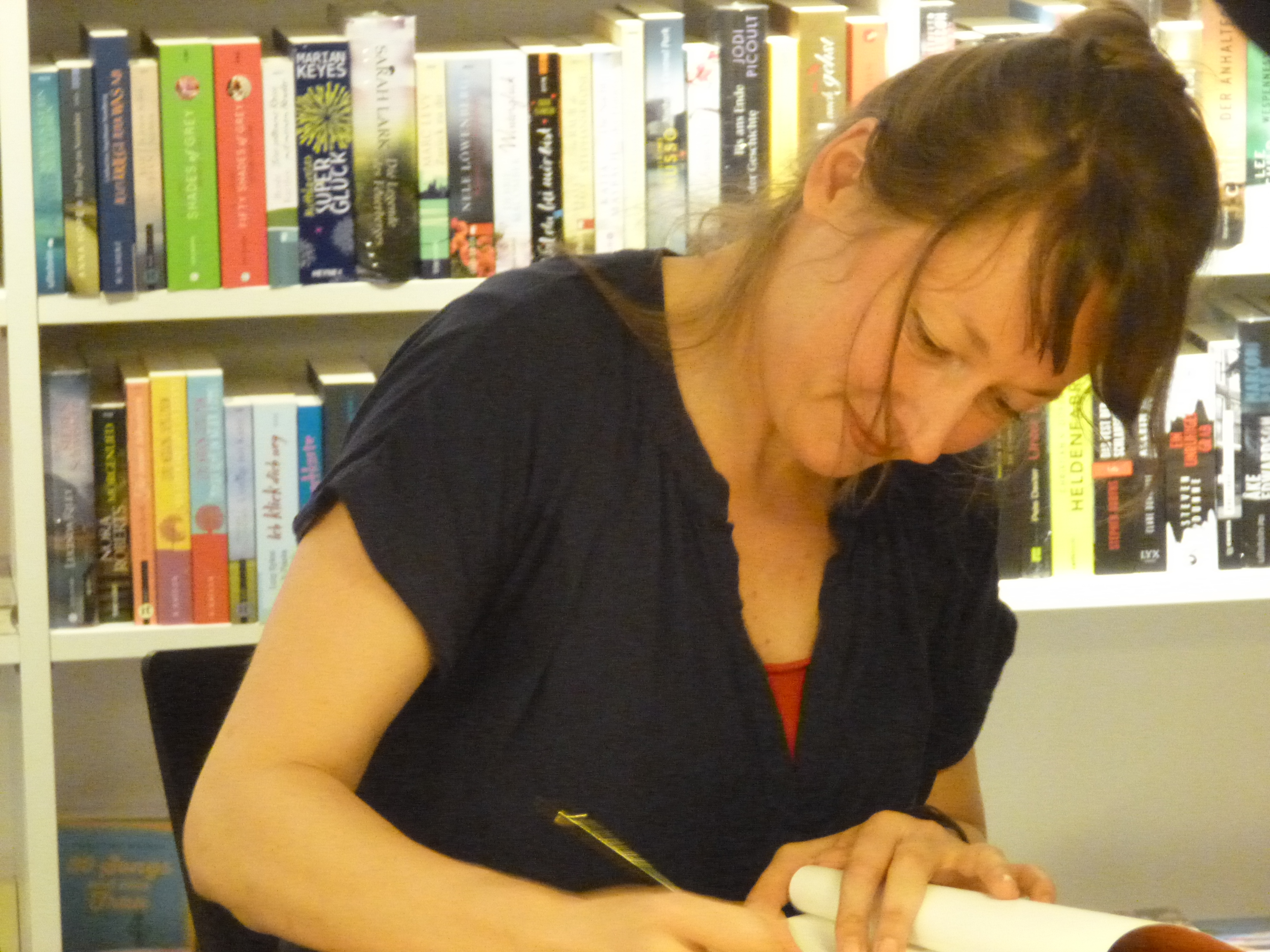 Barbara Yelin bei transfer in Dortmund 2015